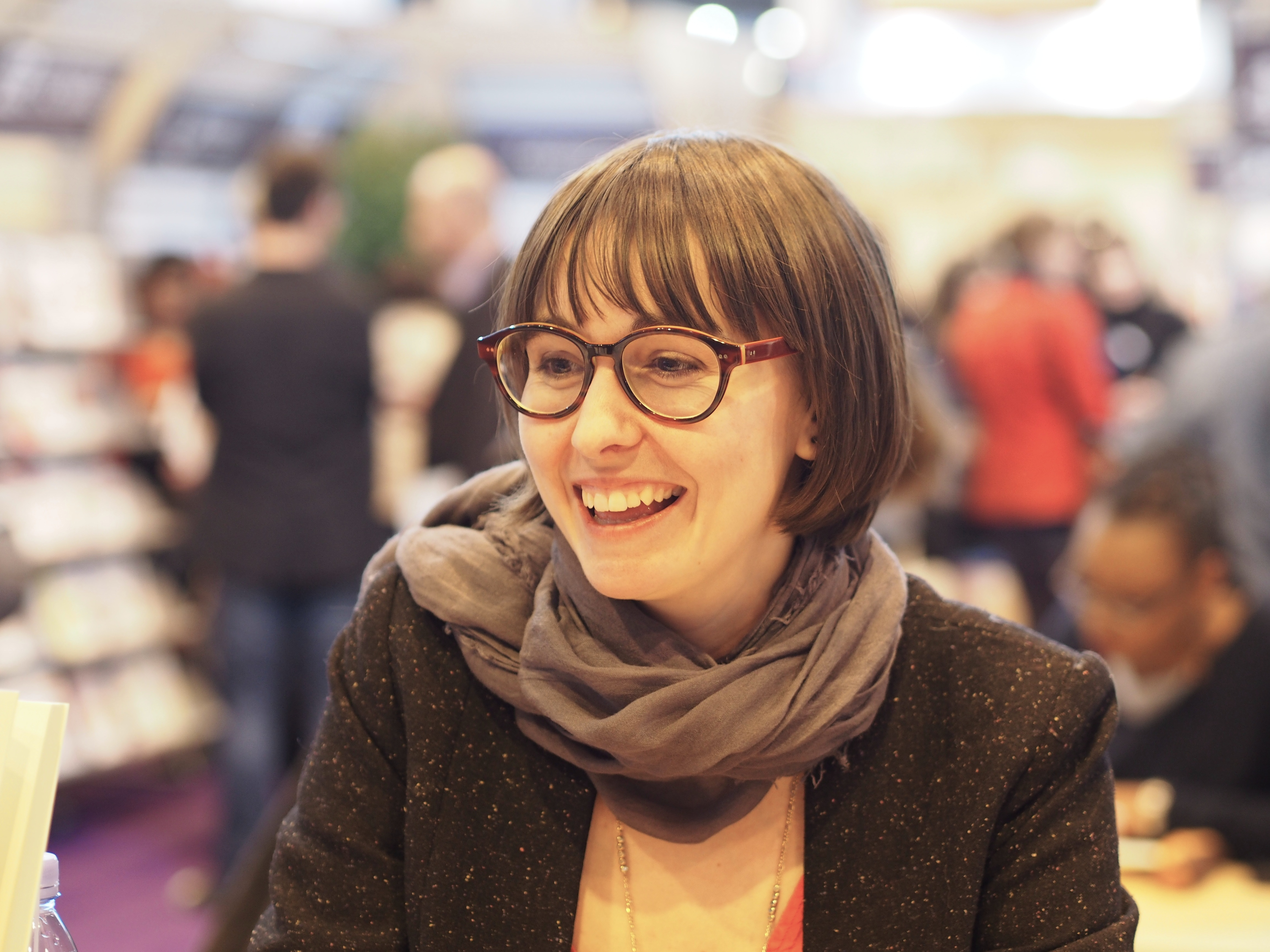 Catherine Leroux au Salon du livre de Paris, le dimanche 23 mars 2014.